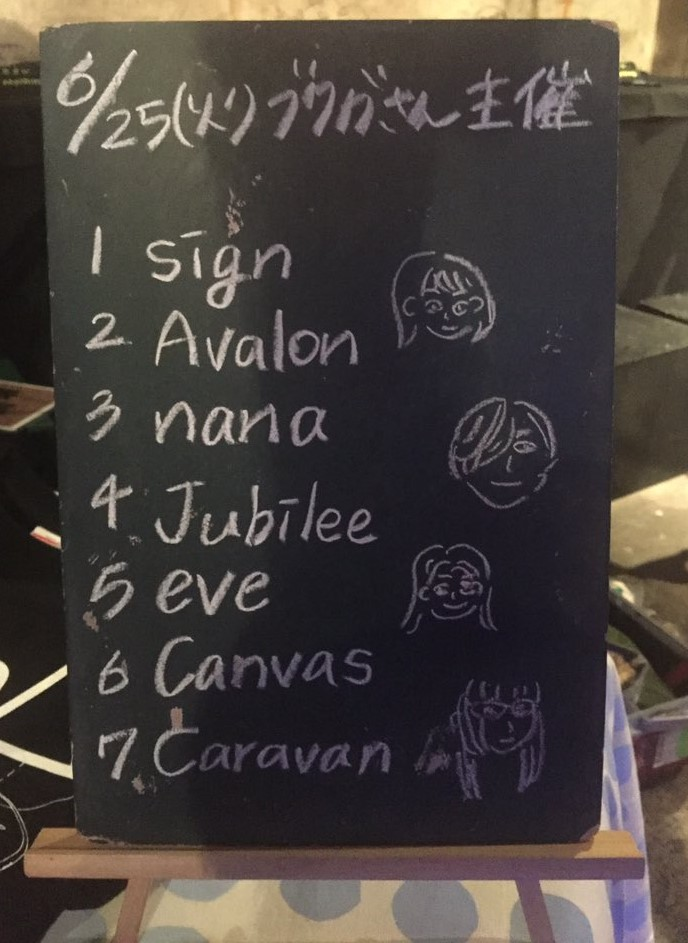 amiinAセトリボード